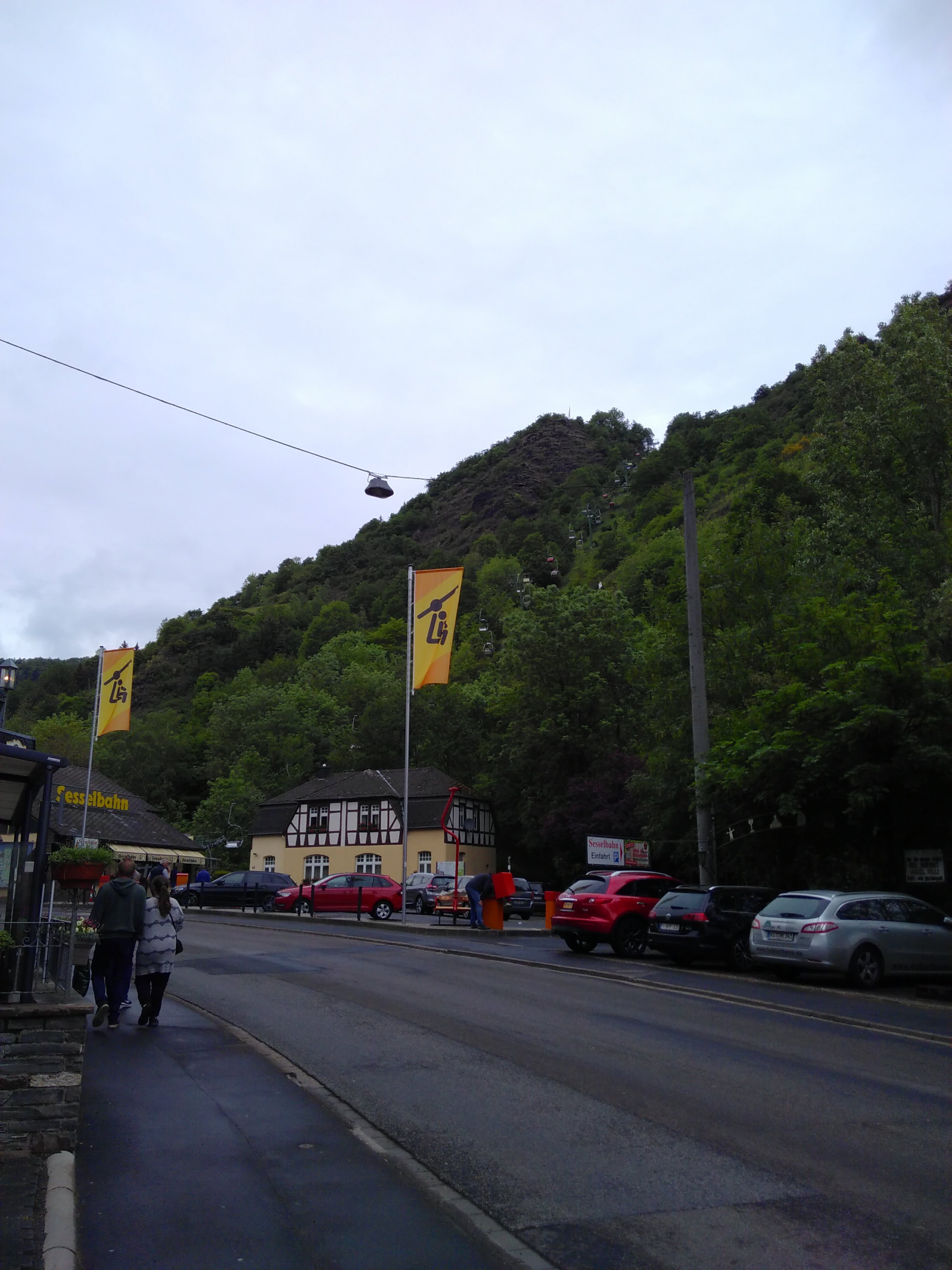 Zetellift Cochem